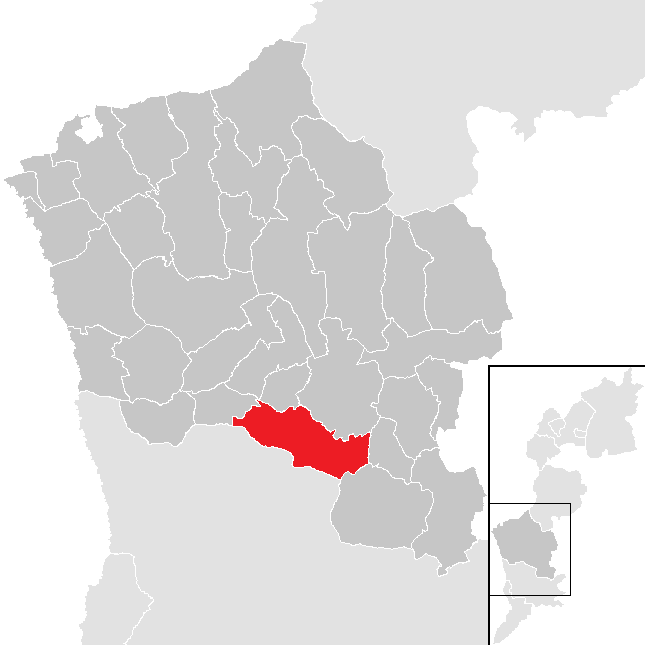 Bezirk Oberwart